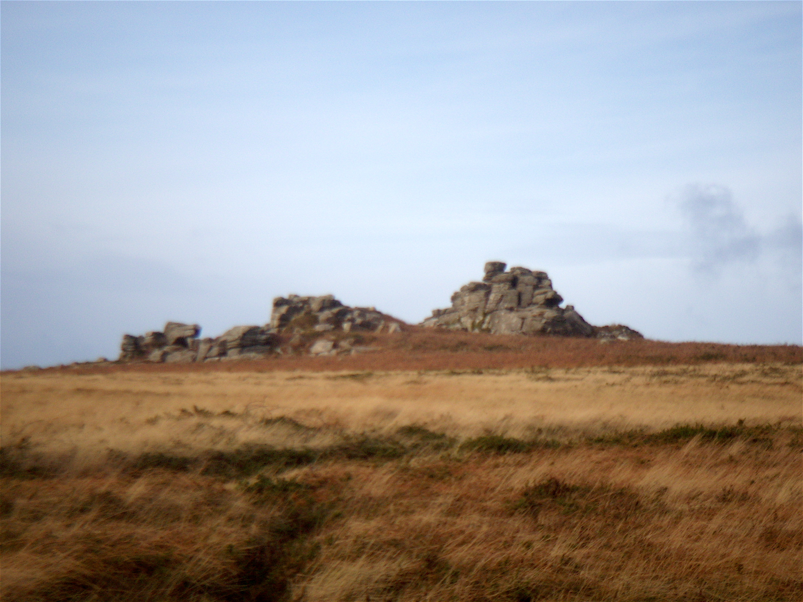 Carn Kenidjack